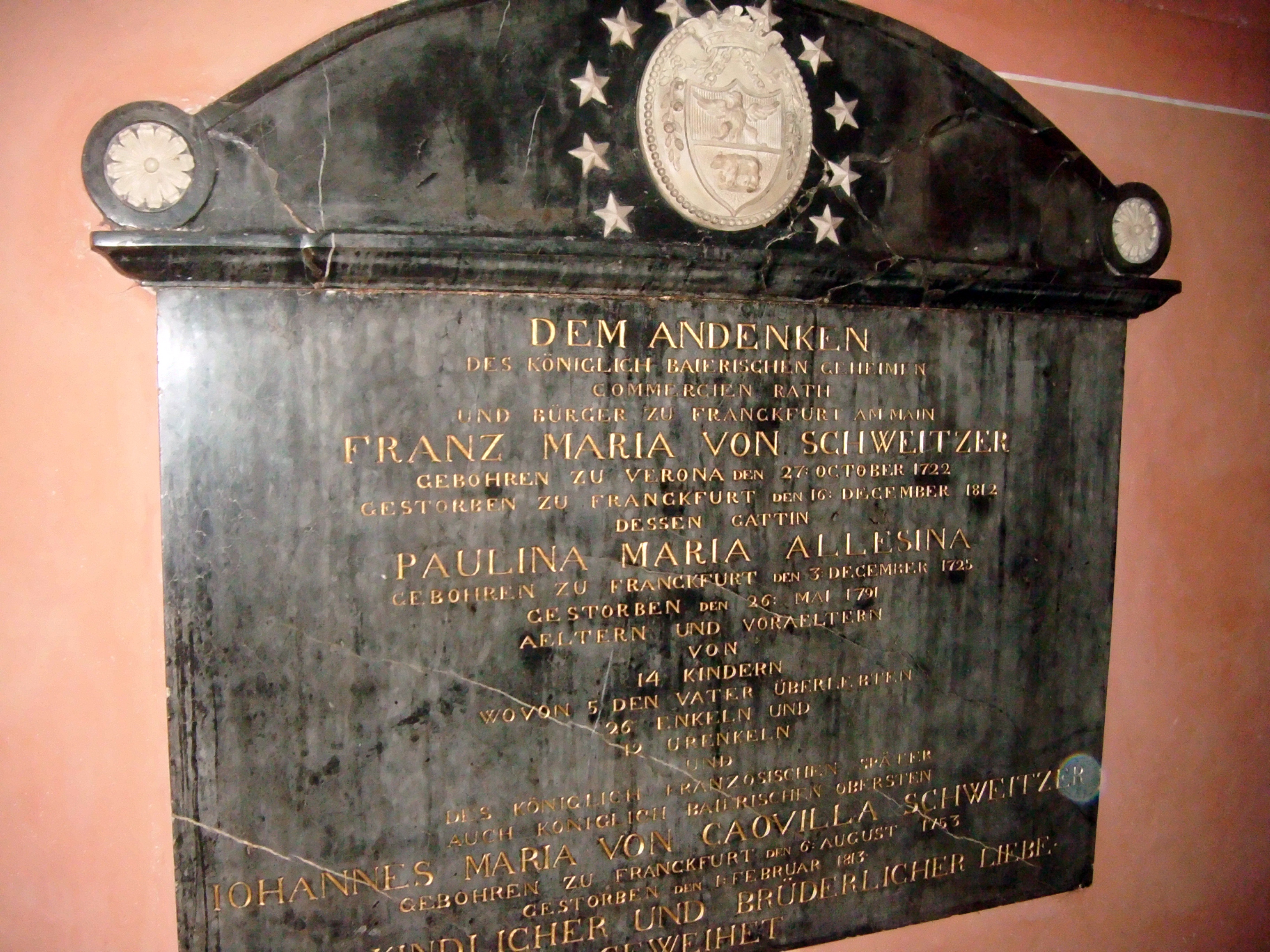 Franz Maria Schweitzer (1722-1812), Frankfurter Handelsherr, Epitaph im Kaiserdom Frankfurt